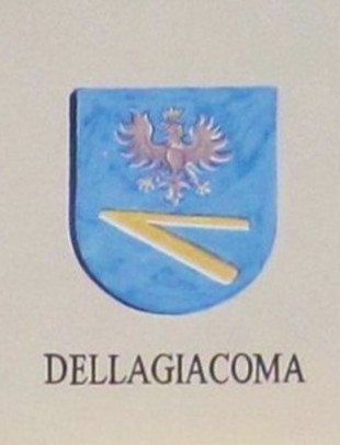 Cognomi storici dei Vicini che discendono dalle famiglie della Regola che abitavano a Predazzo e riguardano 19 cognomi: Boninsegna, Bonora, Bosin, Brigadoi, Defrancesco, Degaudenz, Dellagiacoma, Dellantonio, Dellasega, Demartin, Dezulian, Felicetti, Gabrielli, Giacomelli, Guadagnini, Morandini, Nicolao, Piazzi e Zanna.